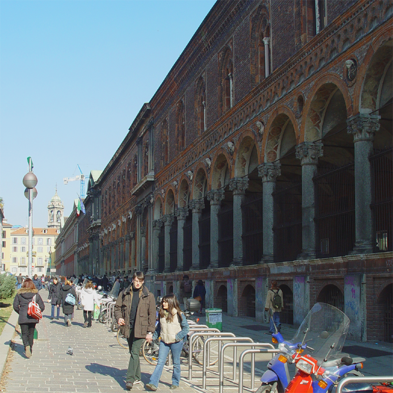 Description Università degli studi di Milano (Milan State University) Date February 26, 2003 Location Via Festa del Perdono - Milano Photographer Franco Folini